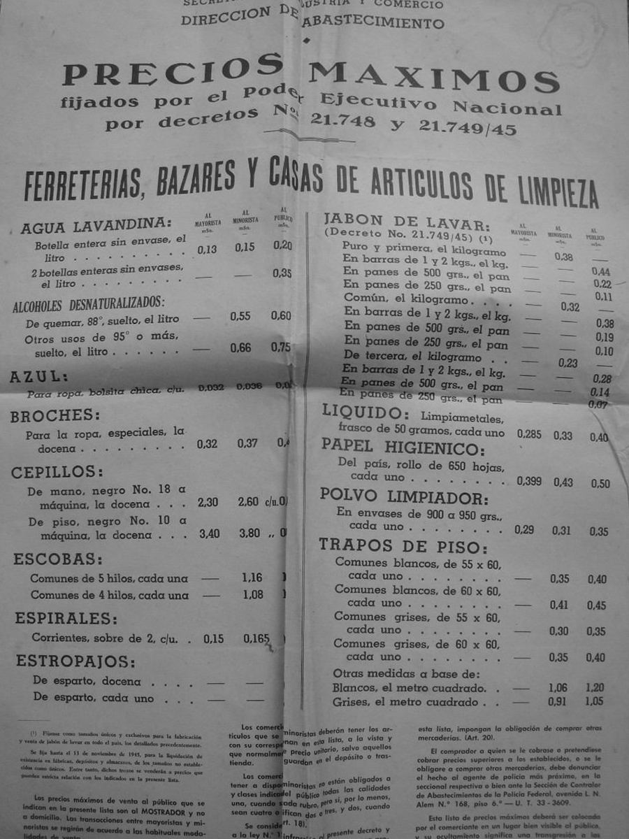 Listado de precios máximos, publicados por el gobierno de Argentina en 1945